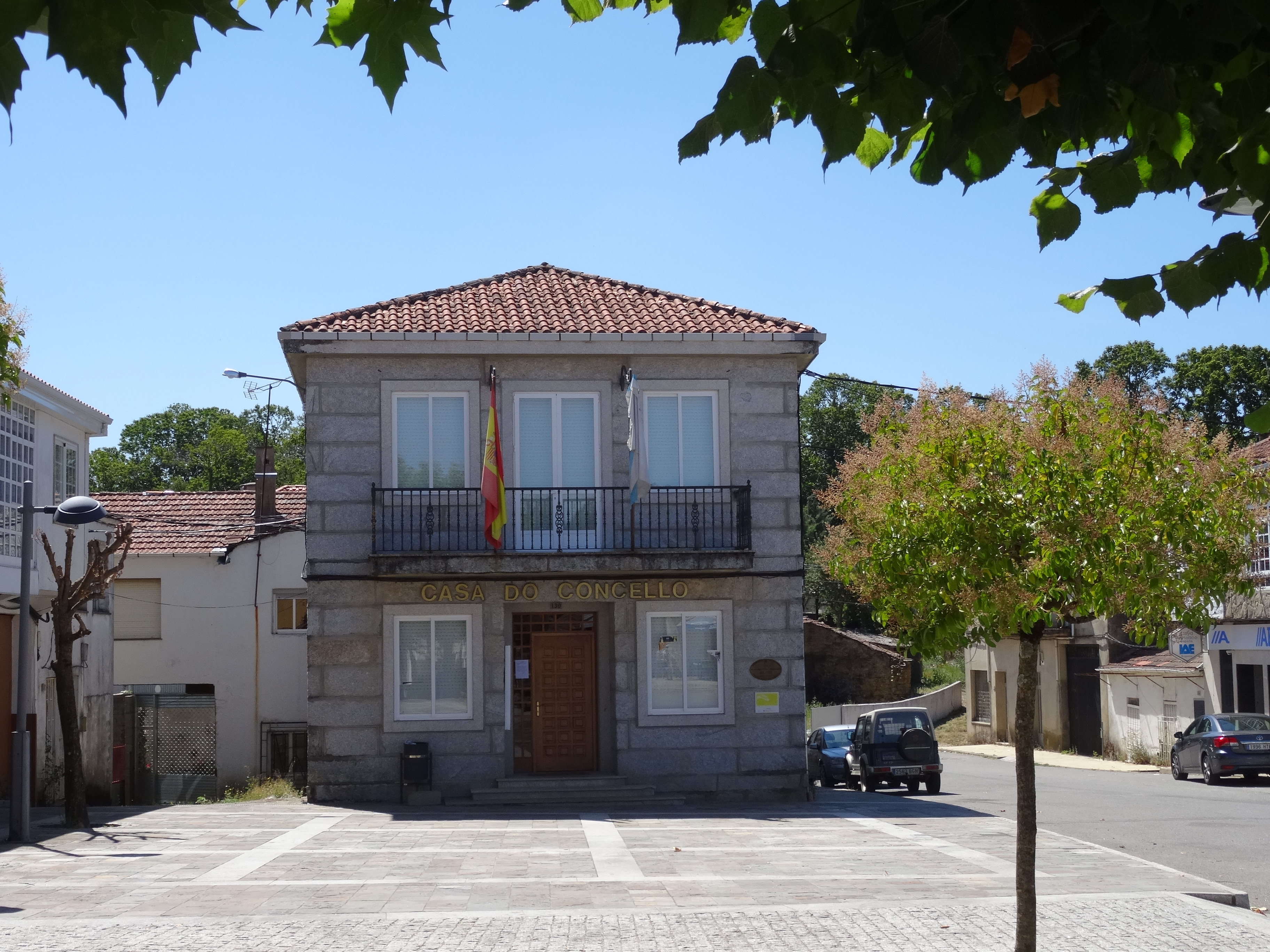 Casa do concello de Riós, Ourense.